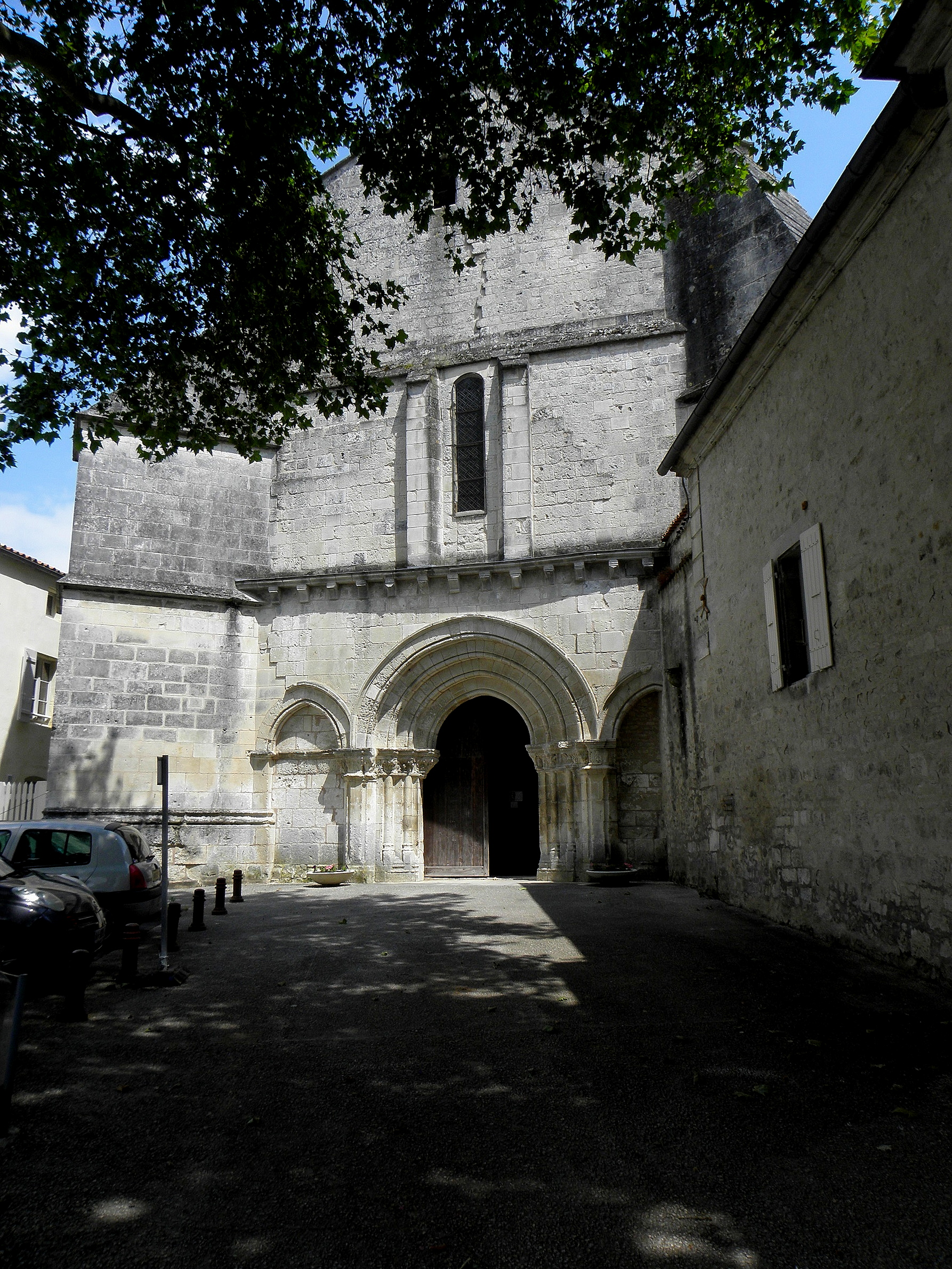 Église Saint-Pallais de Saintes (17). Façade occidentale.